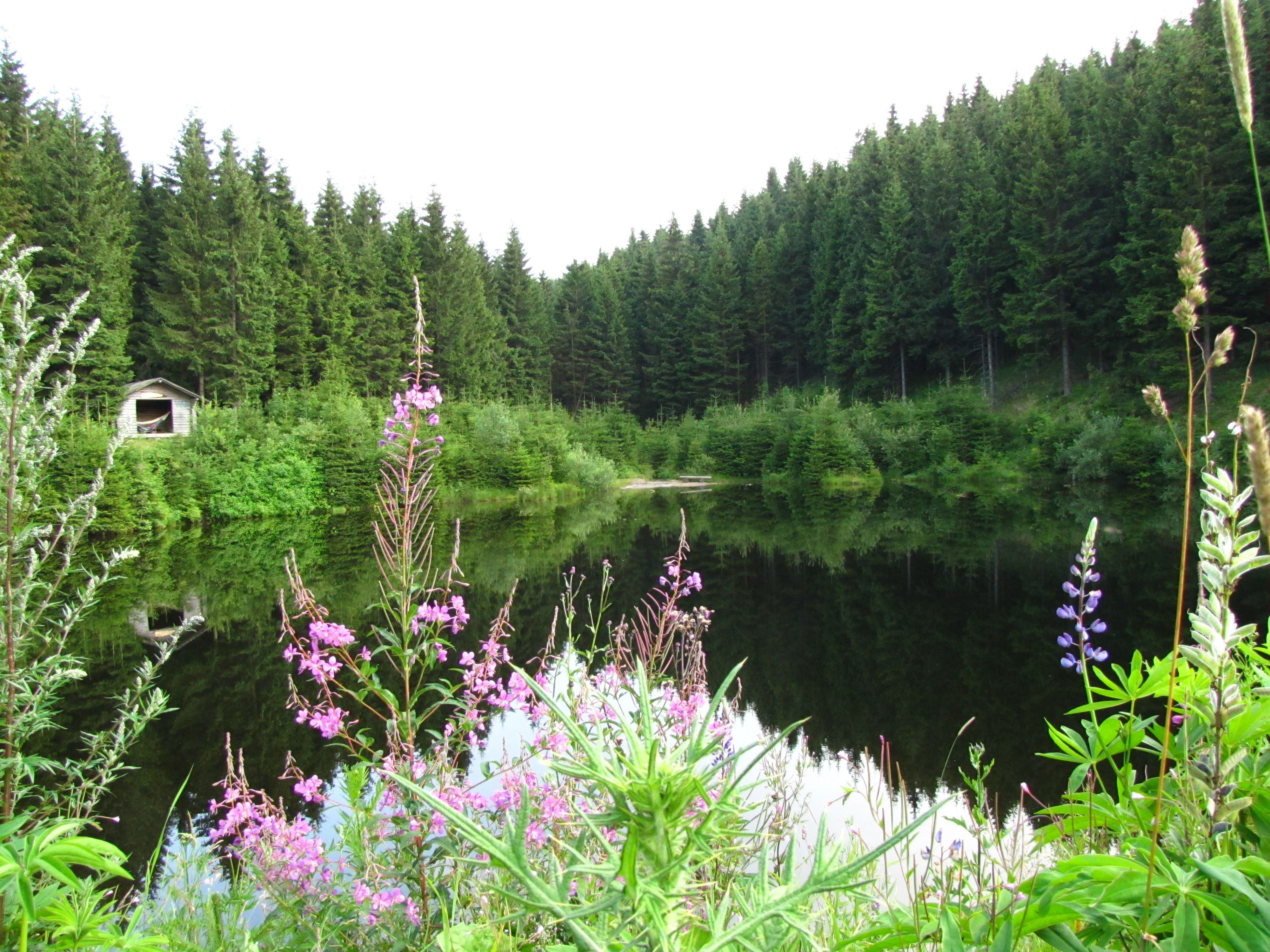 Flößerteich an der Vierenstraße am Fuß des Fichtelbergs, Landschaftsschutzgebiet c 22